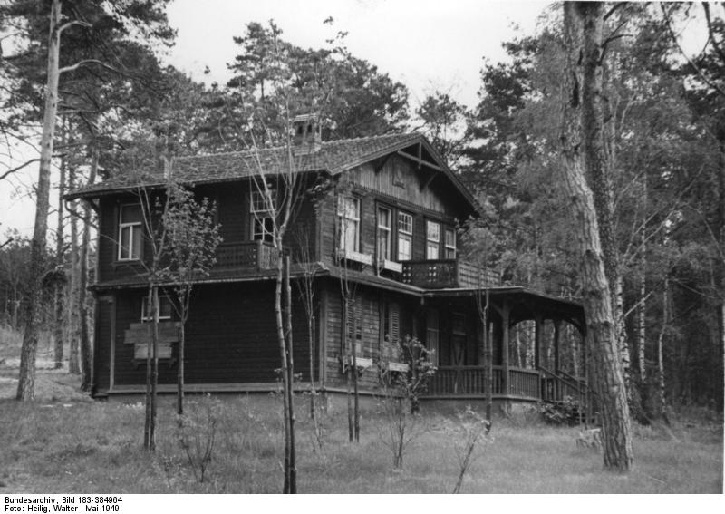 Das Schwedenhaus. Sommerholzhaus bei unserem Erholungsheim Theresienhof. Aufn.: Illus/Heilig 3206-49 5.5.49 Information added by Wikimedia users.